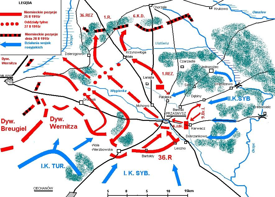 Mapka ukazująca działania wojsk rosyjskich i niemieckich w Bitwie przasnyskiej w 1915 roku